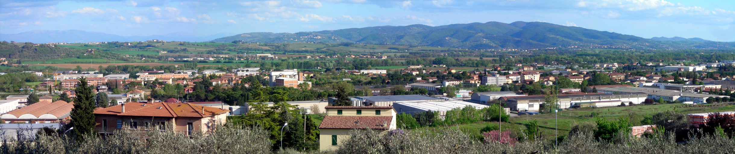 Panorama of Balanzano, Ponte San Giovanni, Perugia, Umbria, Italy